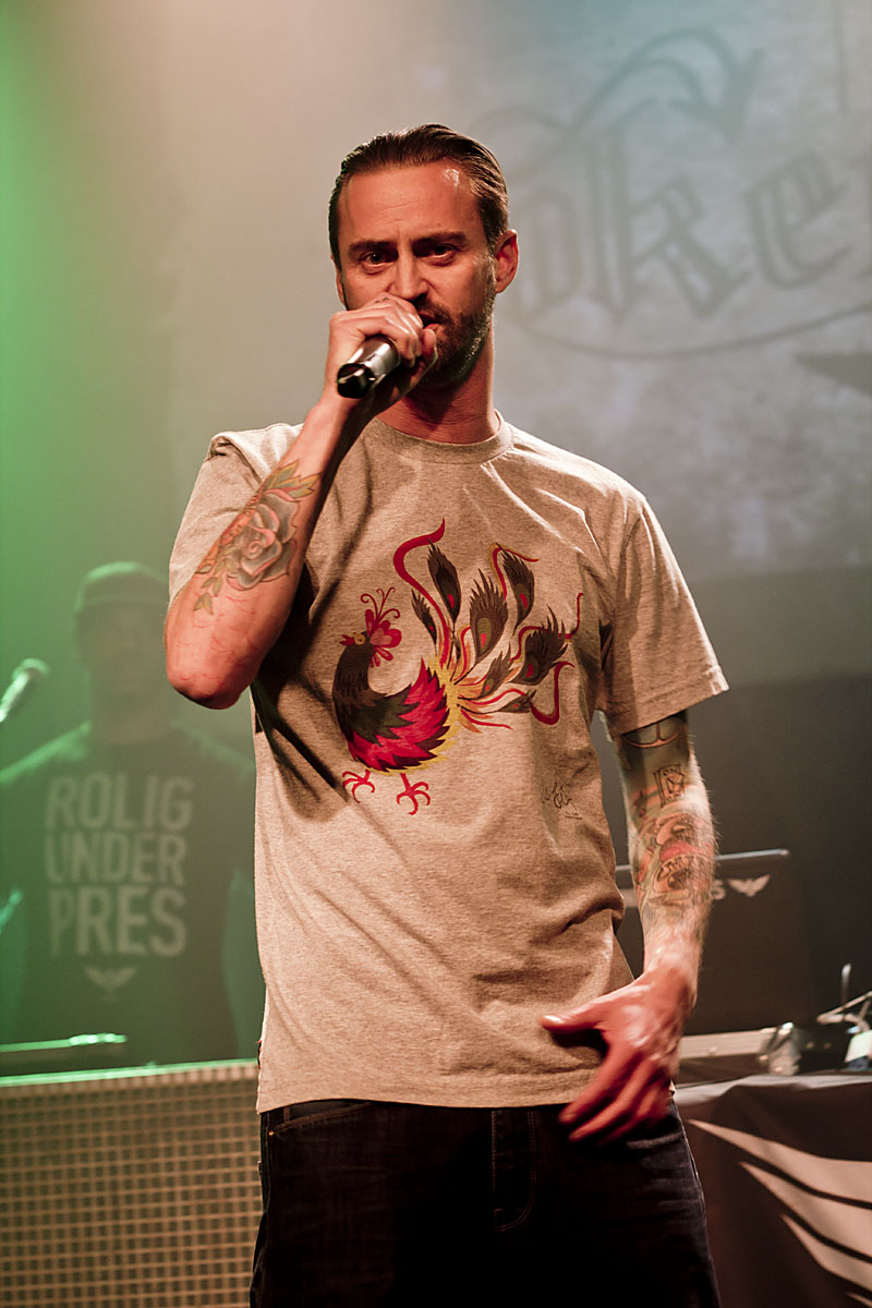 Jokeren på spillestedet Forbrændingen 9. februar 2013